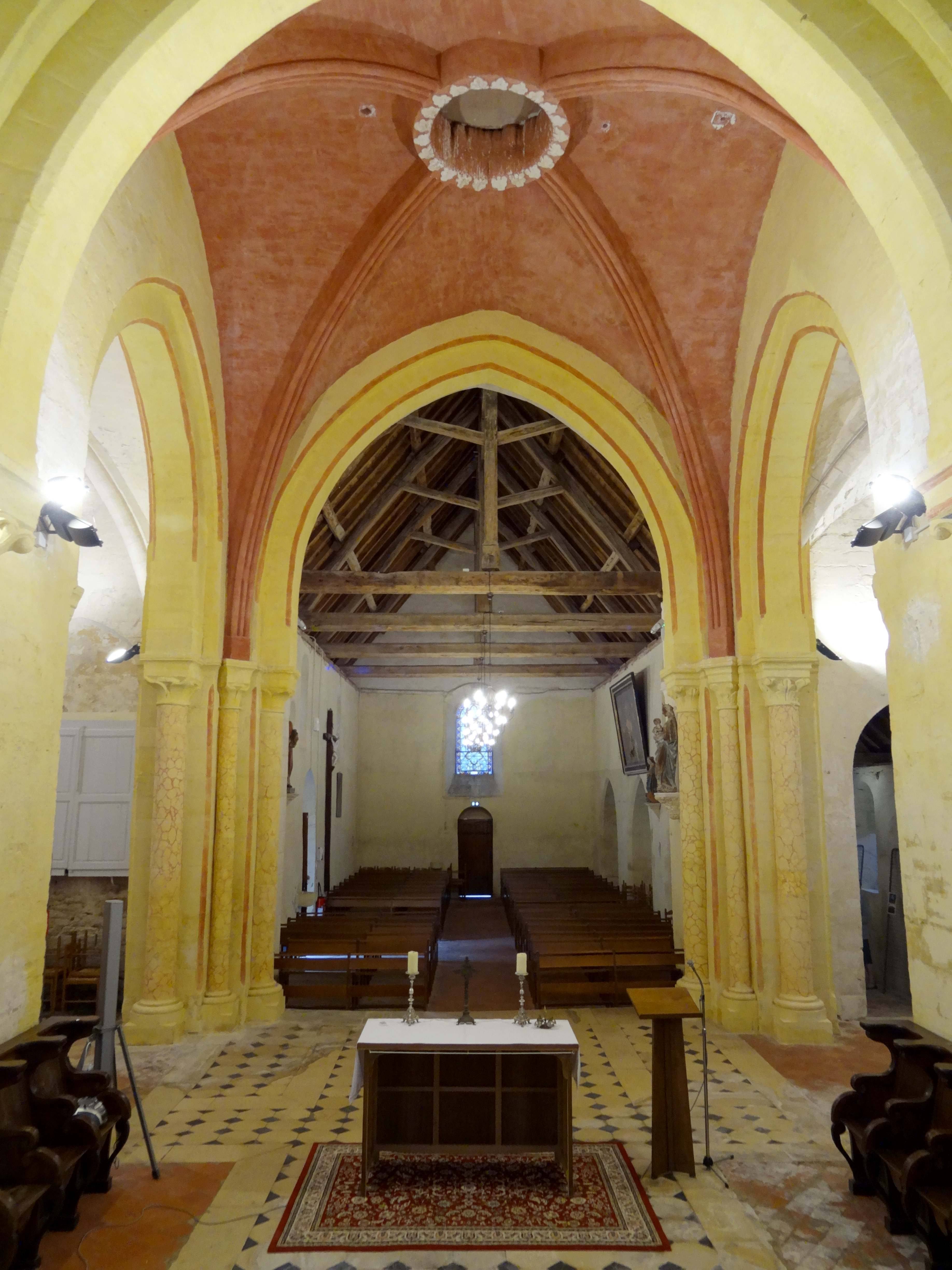 Intérieur de l'église - voir titre.